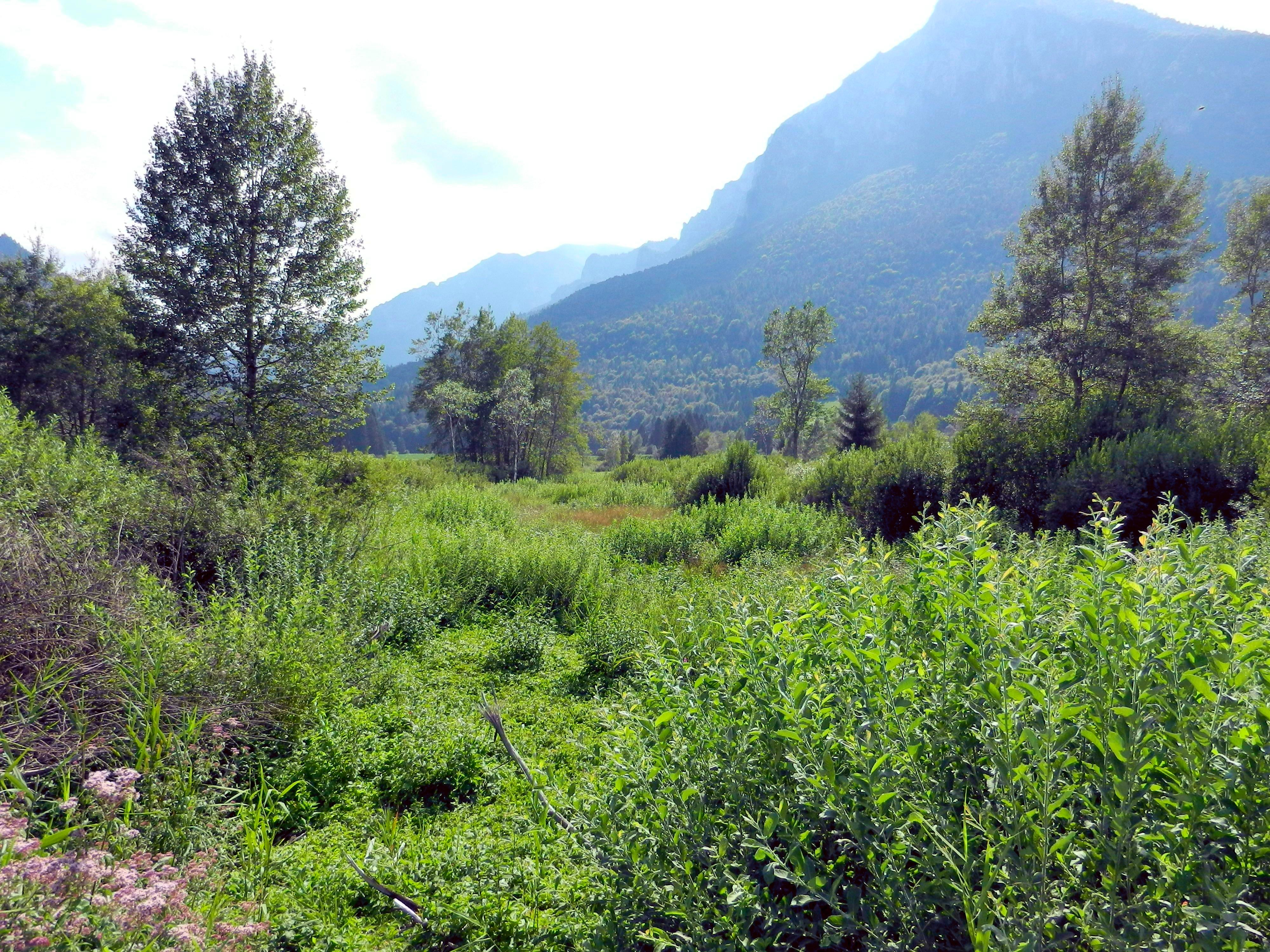 La vegetazione del Biotopo Fiavè